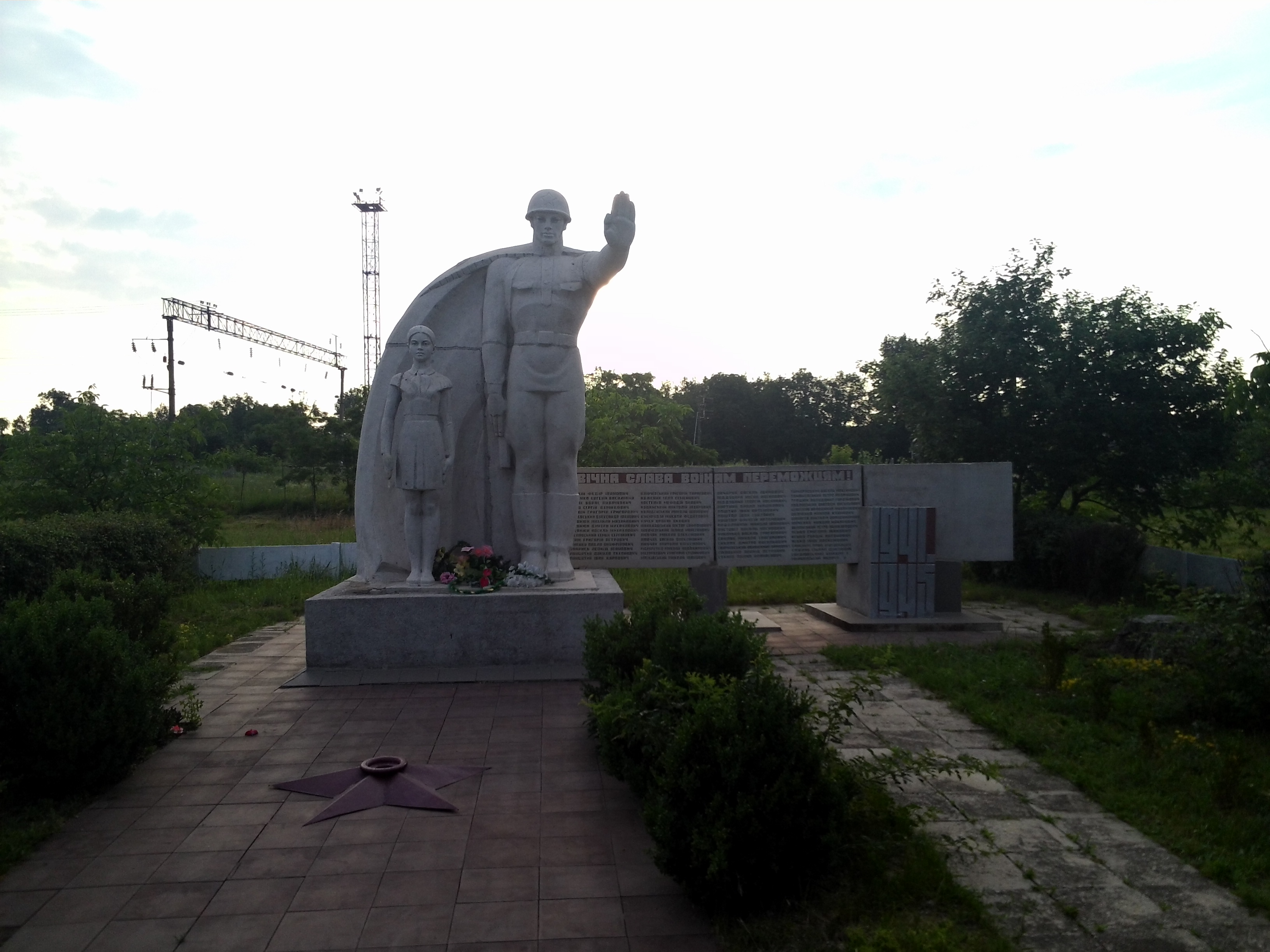 смт Рудниця. Пам’ятник 62 воїнам-односельчанам, загиблим на фронтах Великої Вітчизняної війни